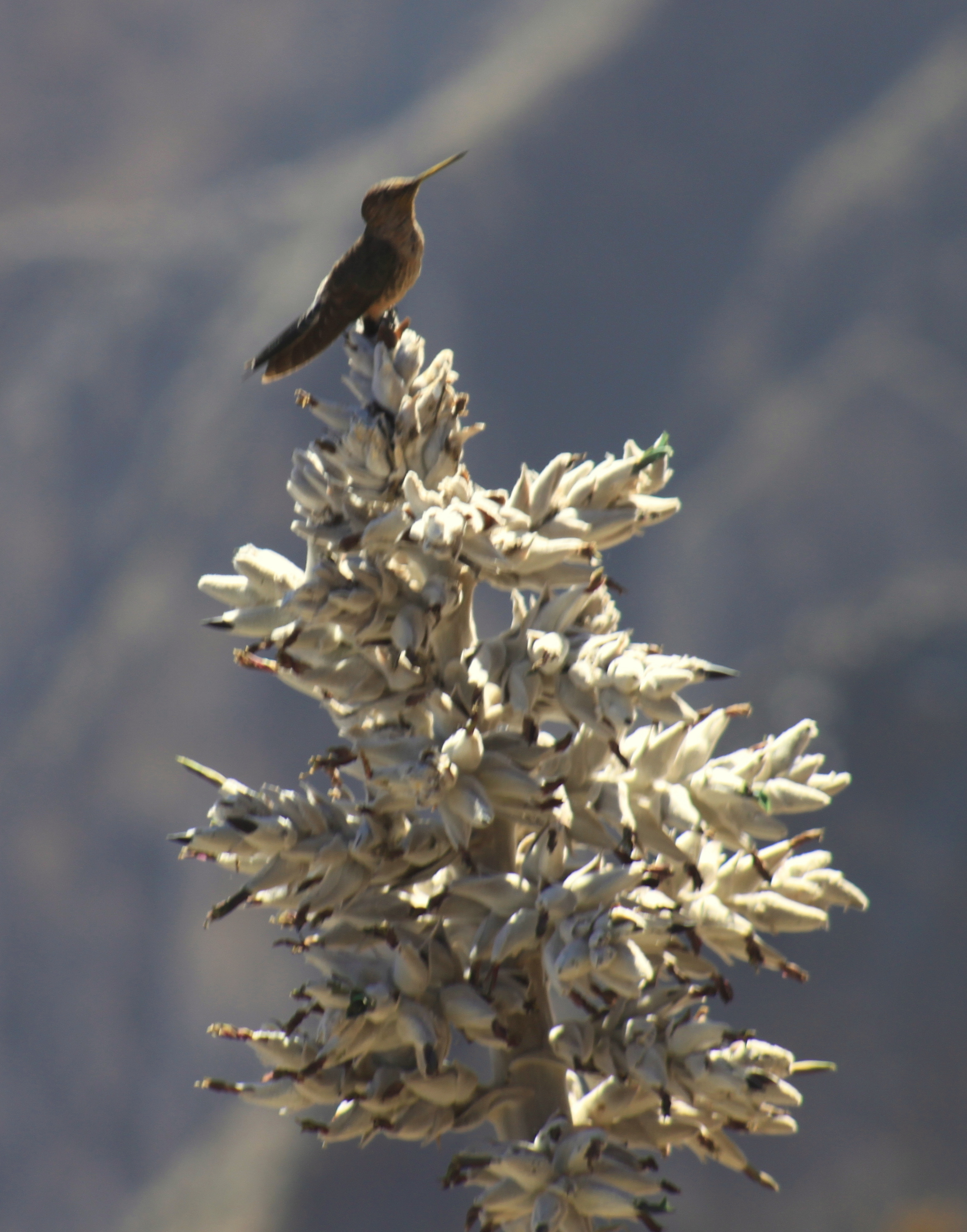 Colibrí gegant a la Vall del Colca, Perú